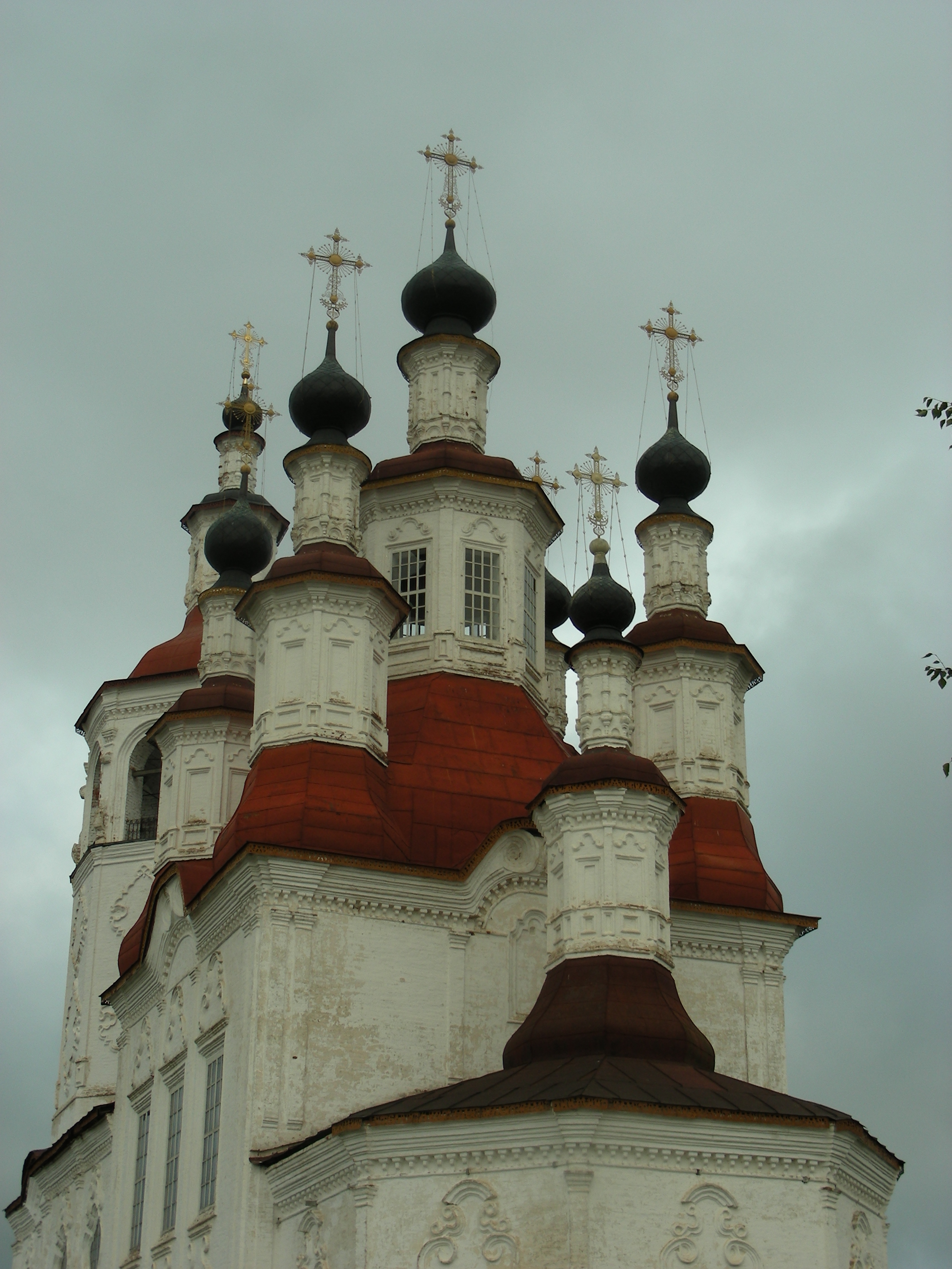 Входоиерусалимская церковь в Тотьме. Венчание